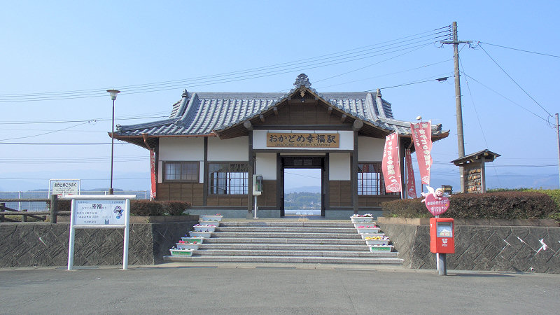 くま川鉄道湯前線ja:おかどめ幸福駅 駅舎 撮影者/著者/著作権保有者 : MK Products (本人がアップロード) 撮影日 : 2007/03/22 おかどめ幸福駅用にアップロードした画像です。良い画像があれば別の画像に変えてください。